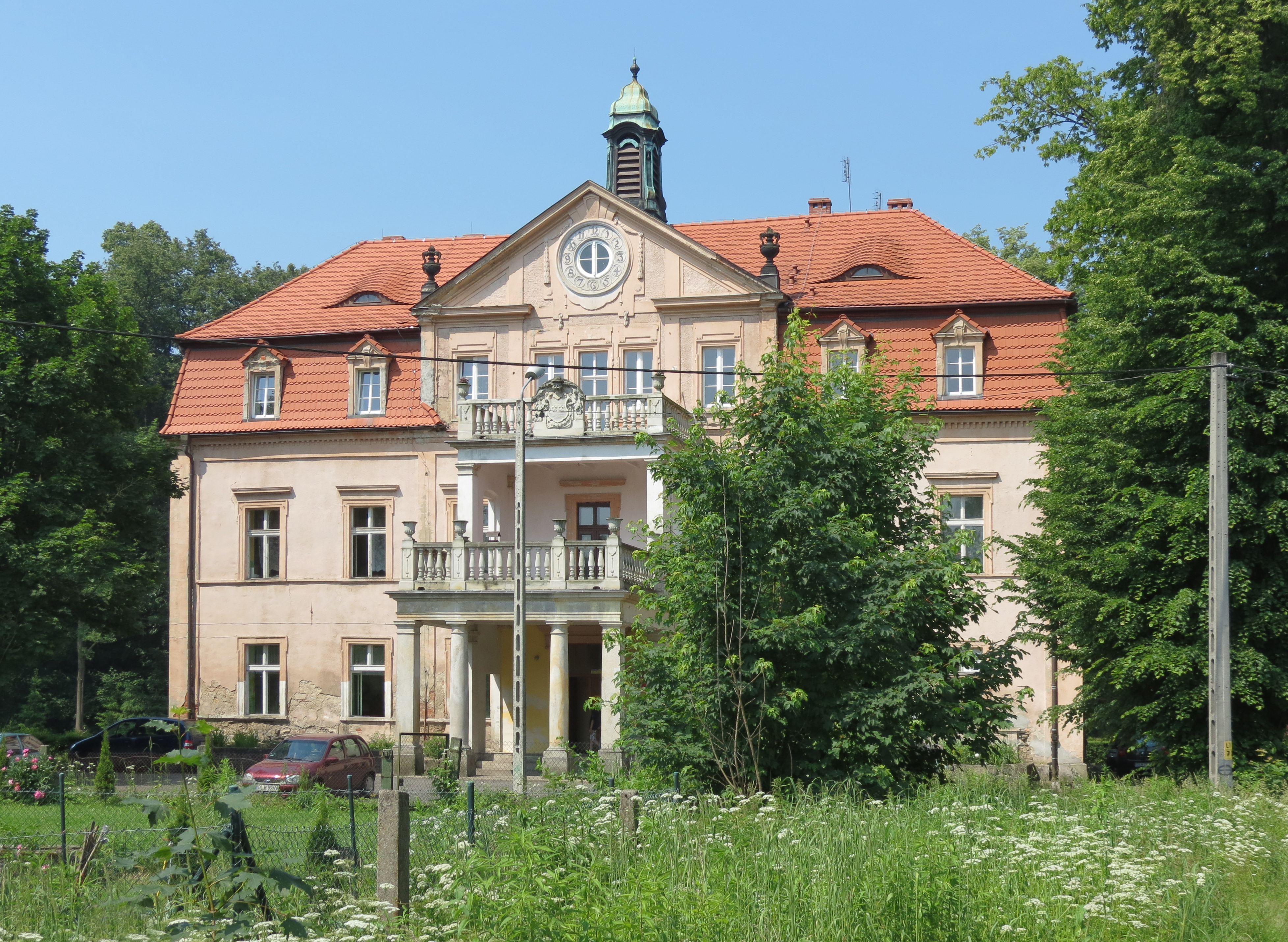 Niwnice, pałac, ob. szkoła, 1800